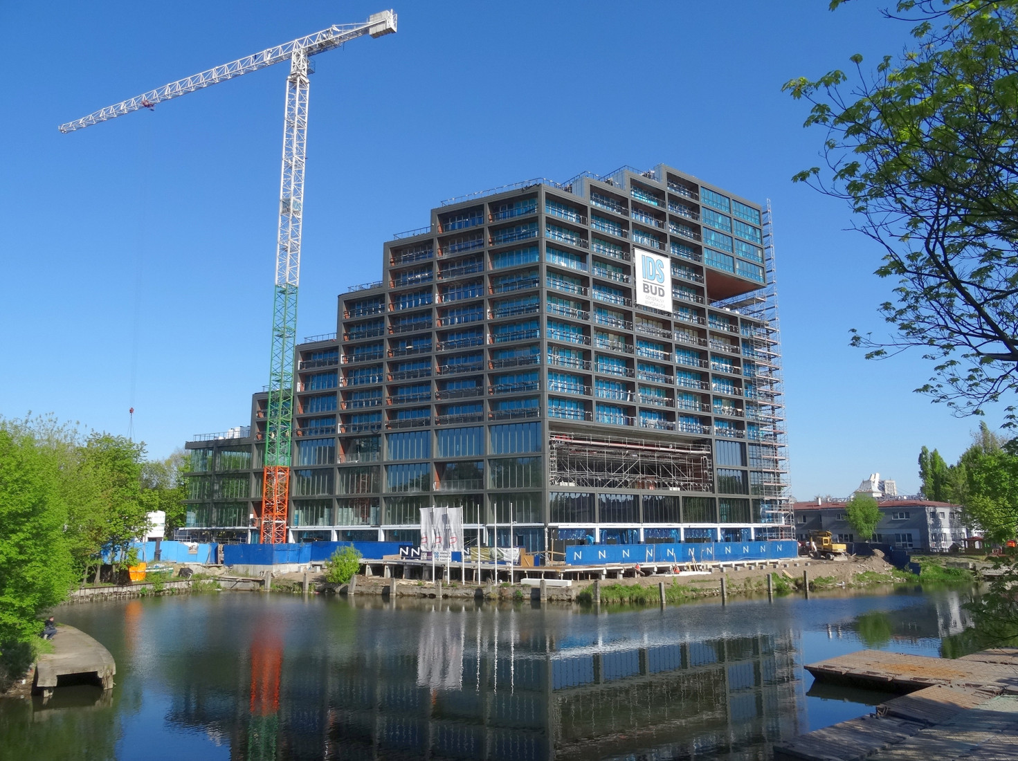 Budynek mieszkalno-biurowy Nordic Haven w Bydgoszczy (16 kondygnacji) w budowie